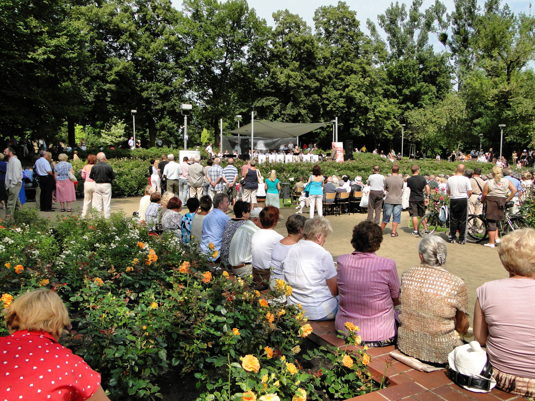 Ogród Różany (Różanka) w Szczecinie